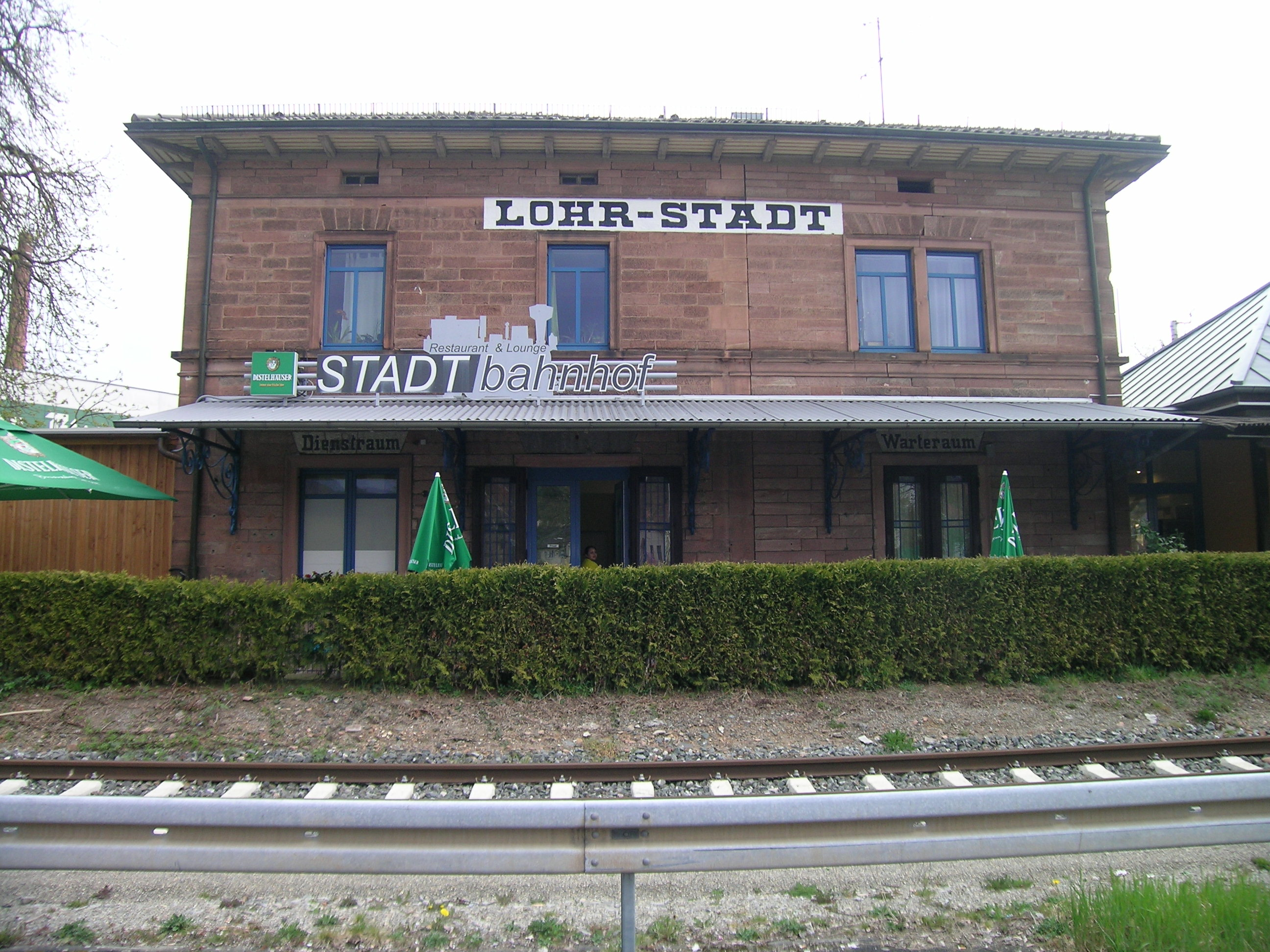 Ehemaliger Bahnhof Lohr-Stadt (Lohr am Main)